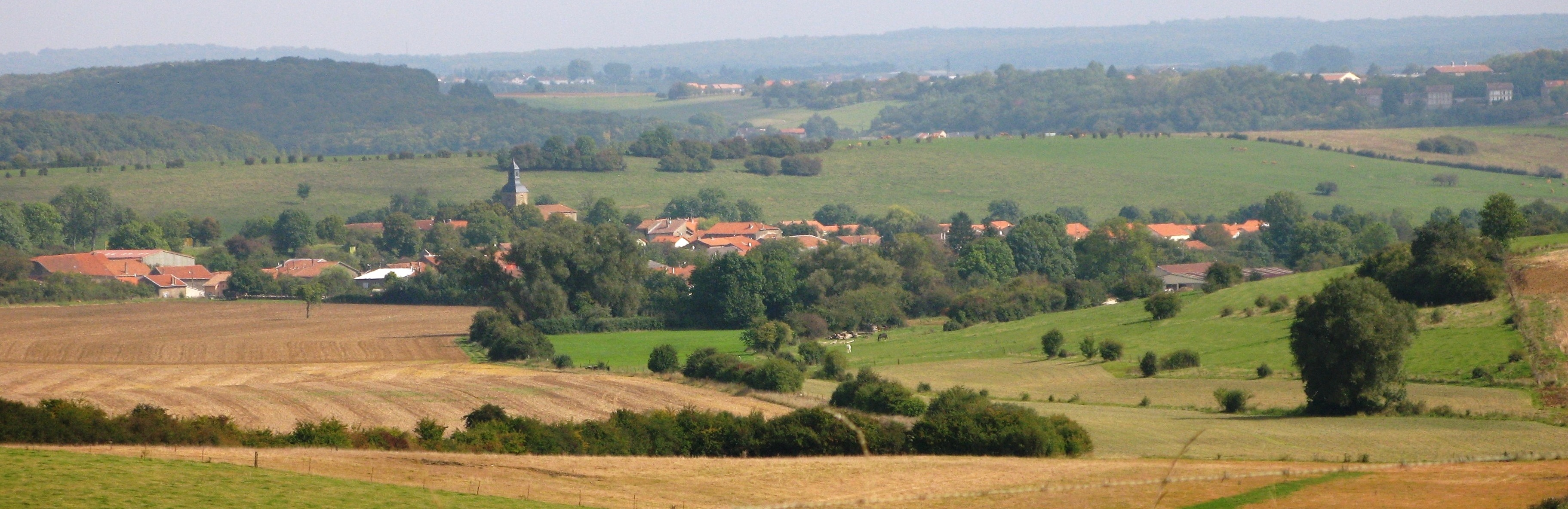 Mairy-Mainville vu de la départementale D952